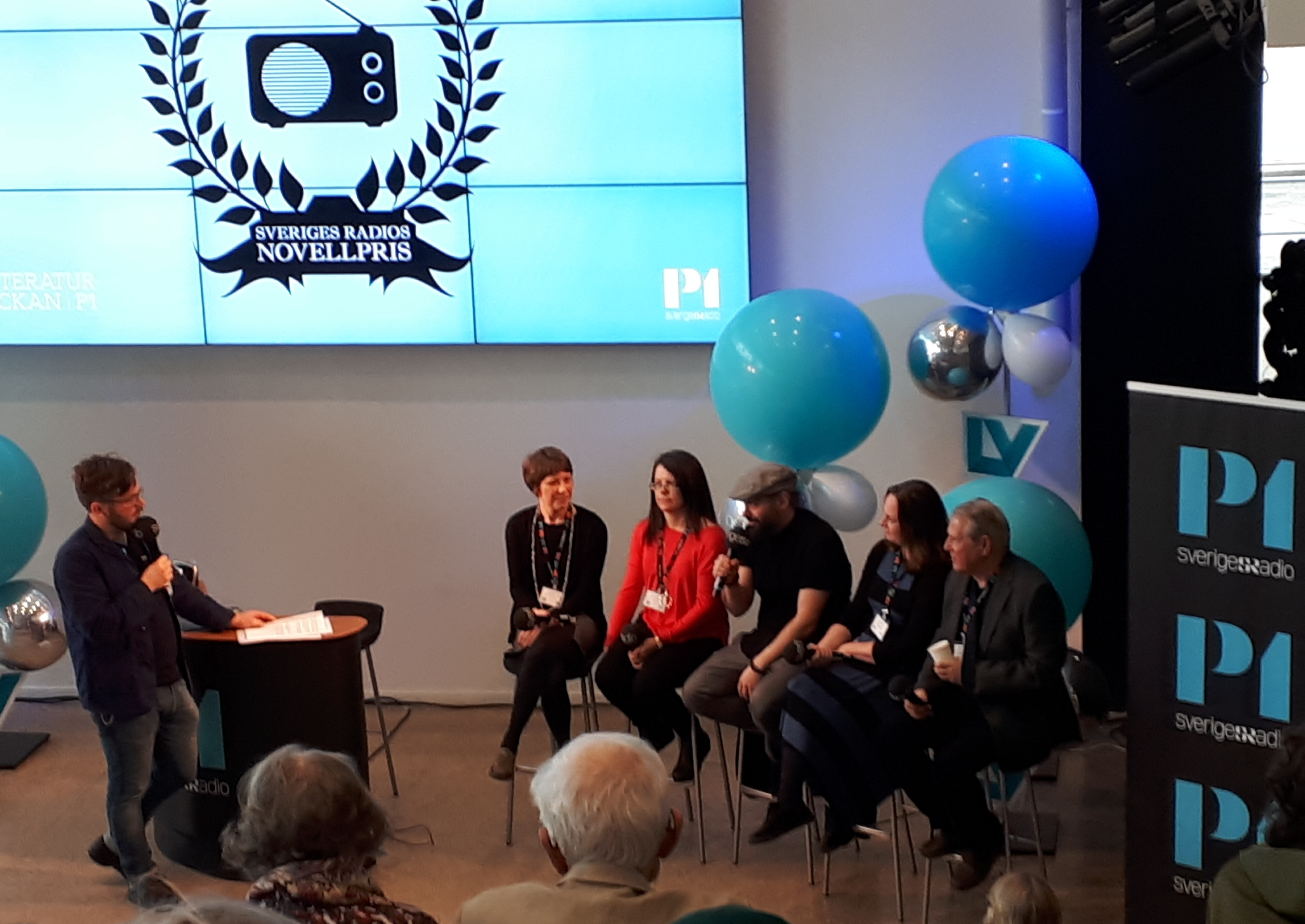 Innan utdelningen av Sveriges Radios Novellpris 2018 med de nominerade, på Stadsbiblioteket i Göteborg den 27 april som sen vanns av Nicolas Kolovos (med mikrofonen) för novellen Underverket. Övriga nominerade 2018 Åsa Foster, Anna Kuru, Jessica Schiefauer och Åke Smedberg.